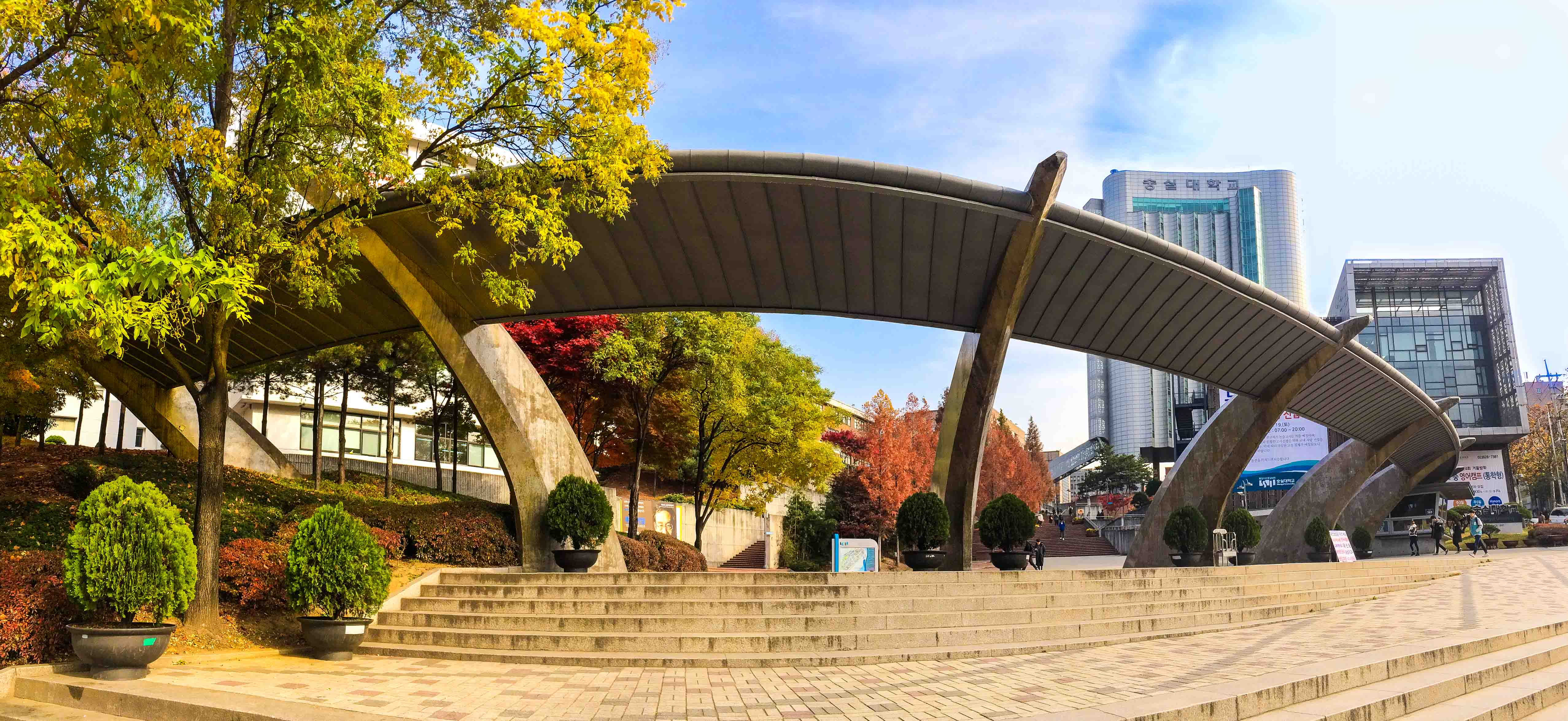 Soongsil University. Blick auf das Haupttor.